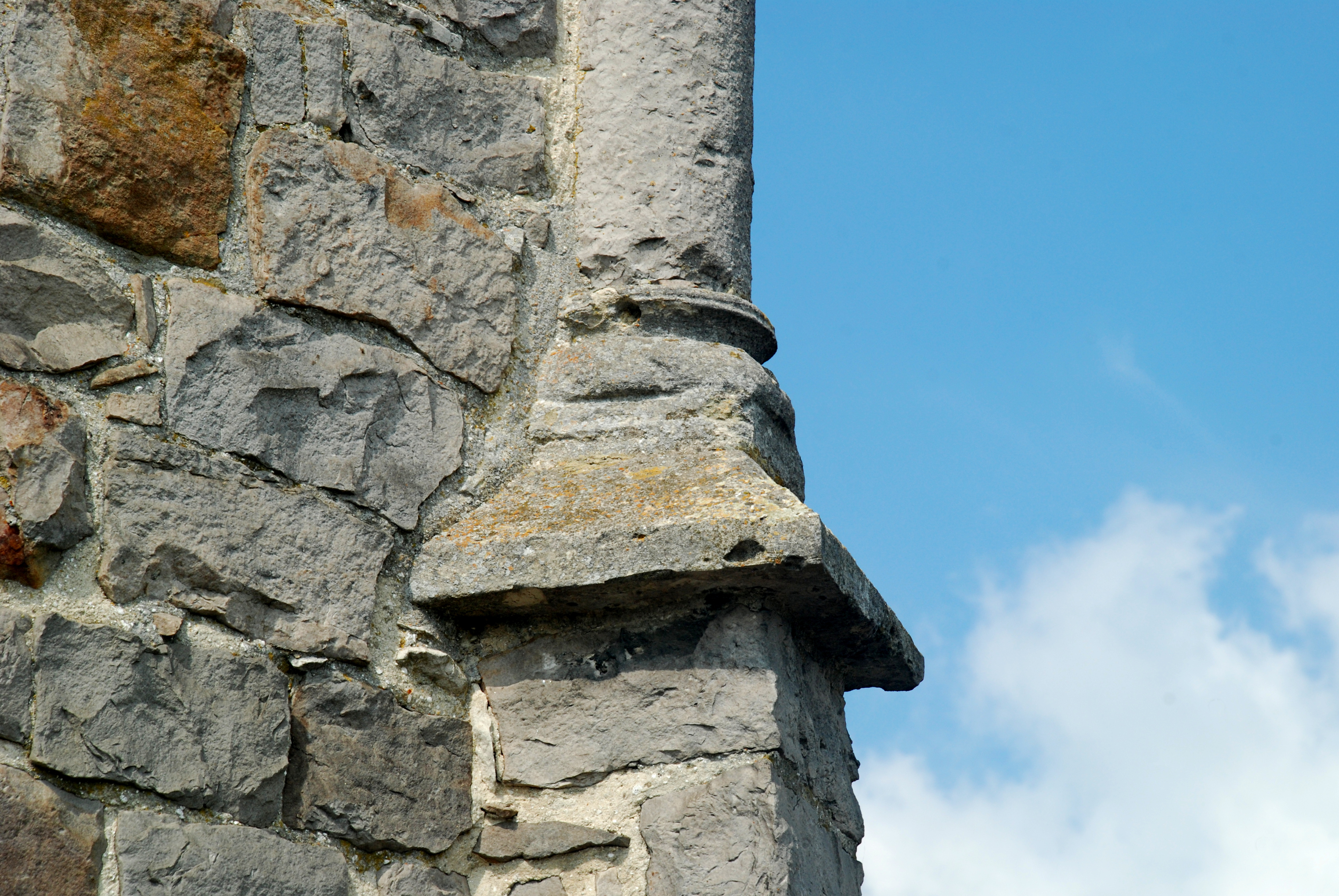 Belgique - Brabant wallon - Jodoigne - Piétrain - Chapelle Sainte-Catherine d'Herbais